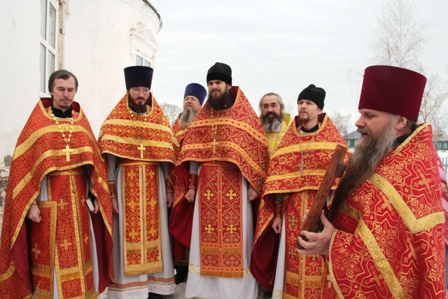 Празднование дня памяти священномученика Василия Константинова-Гришина. с.Кудеиха